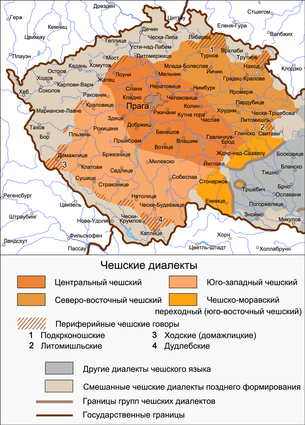 Карта диалектов чешской группы. Источники: Short D. Czech // The Slavonic Languages / Edited by Comrie B., Corbett G. — London, New York: Routledge, 1993. P. 528. — Map 9.1 The main Czech dialect divisions Čeština po síti. Útvary českého národního jazyka (Pavlína Kuldanová)